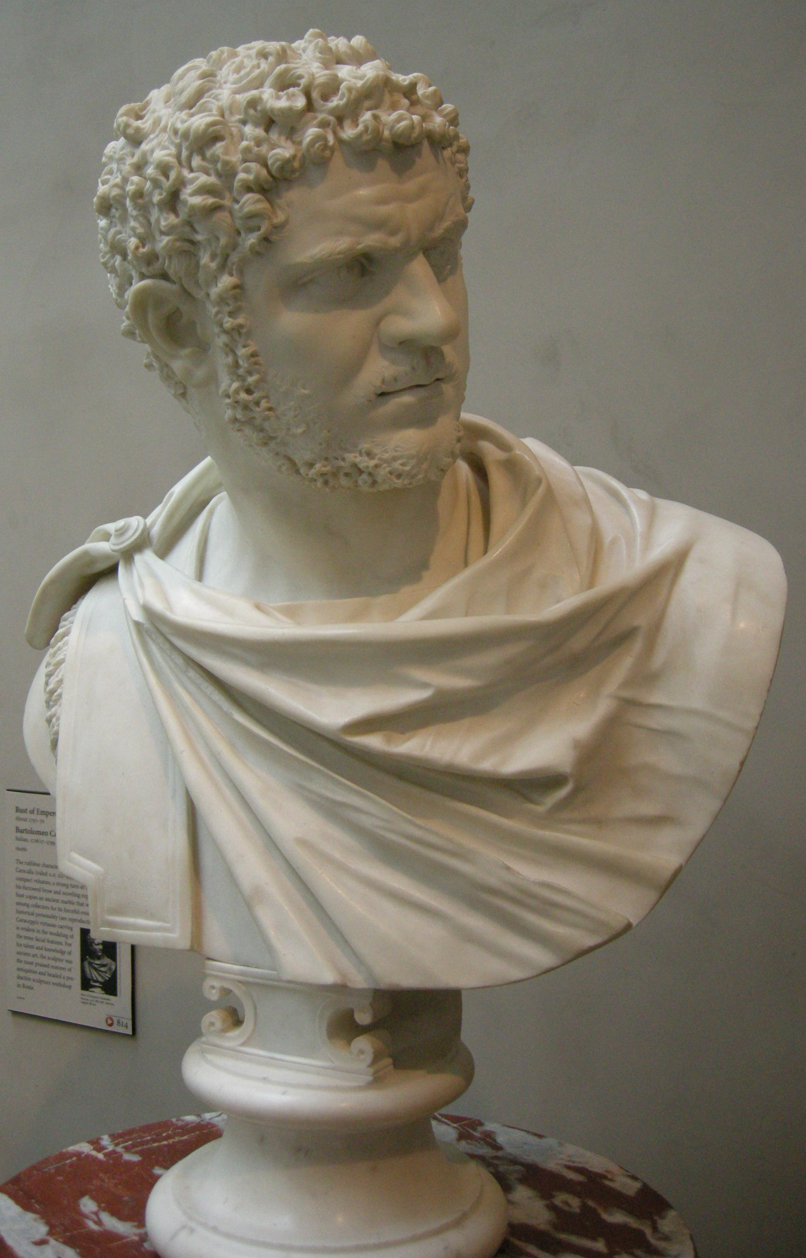 Bartolomeo cavaceppi, busto di caracalla, 1750-70 ca.